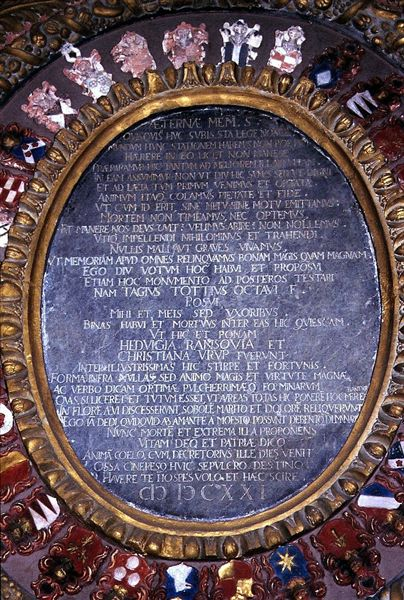 Torrlösa Mariakyrka i Skåne, Sverige. Epitafium overOtte Thott og Sophie Brahe